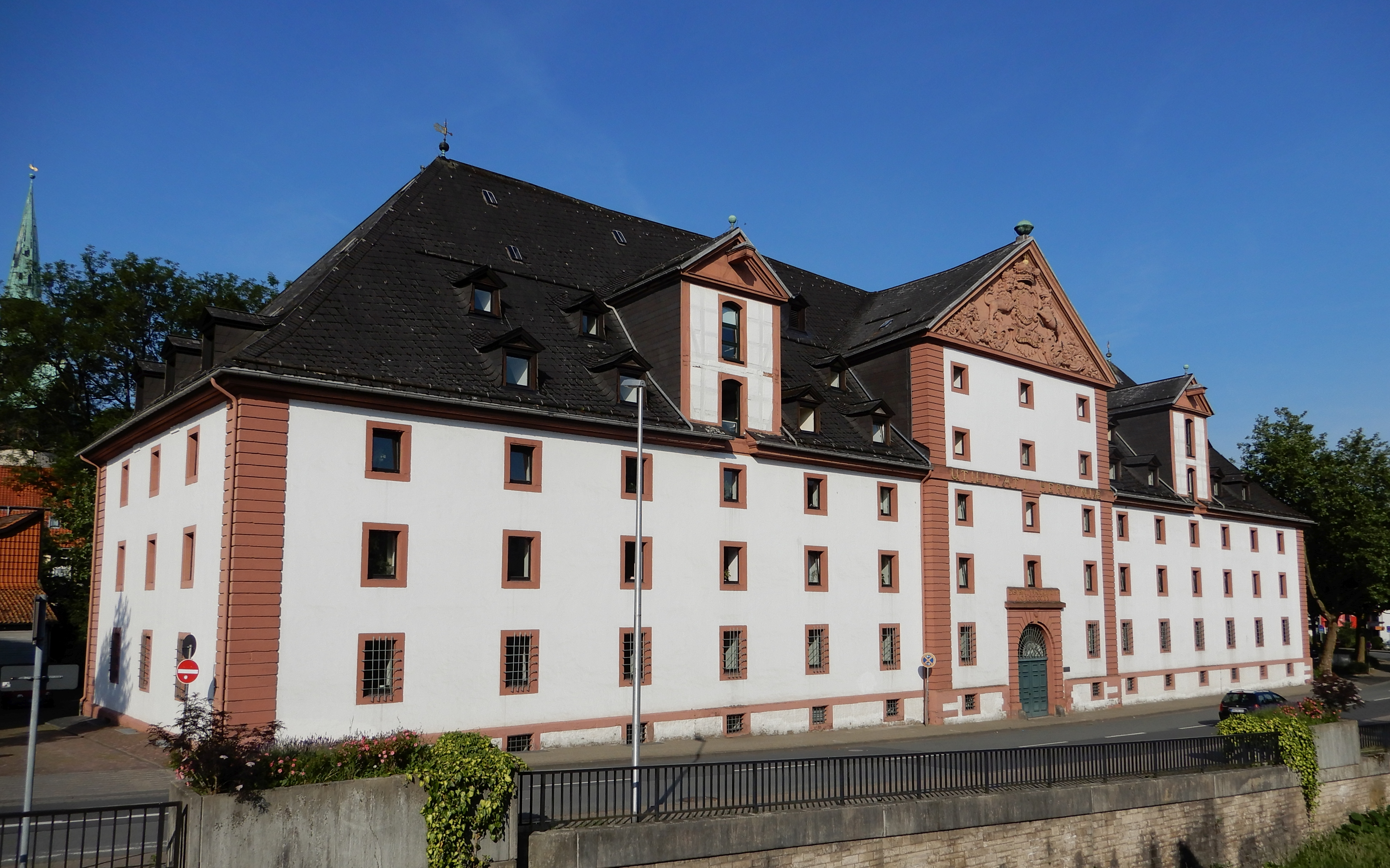 Das Harzkornmagazin in Osterode am Harz, seit 1989 als Rathaus der Stadt genutzt.